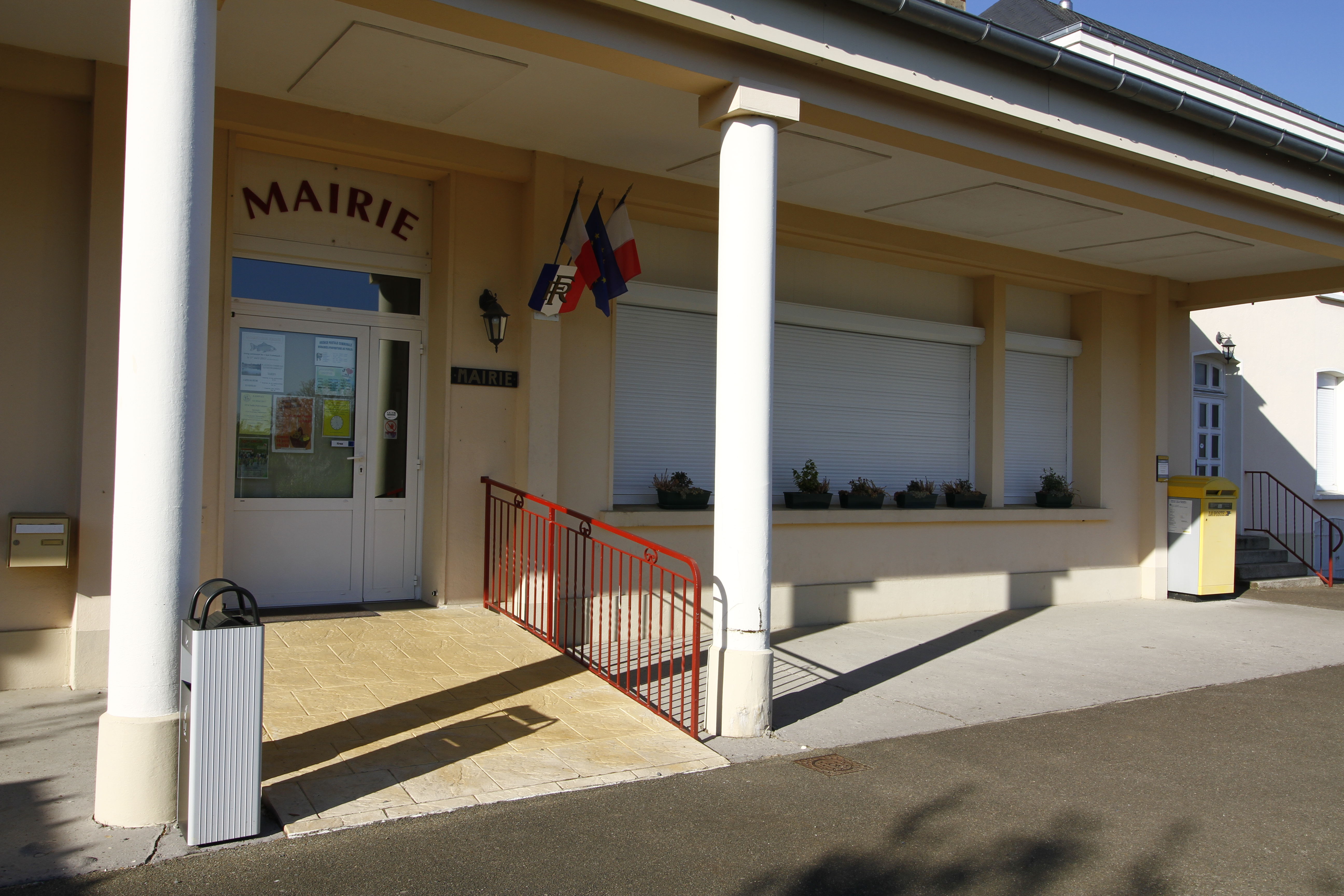 Mairie de Lamnay